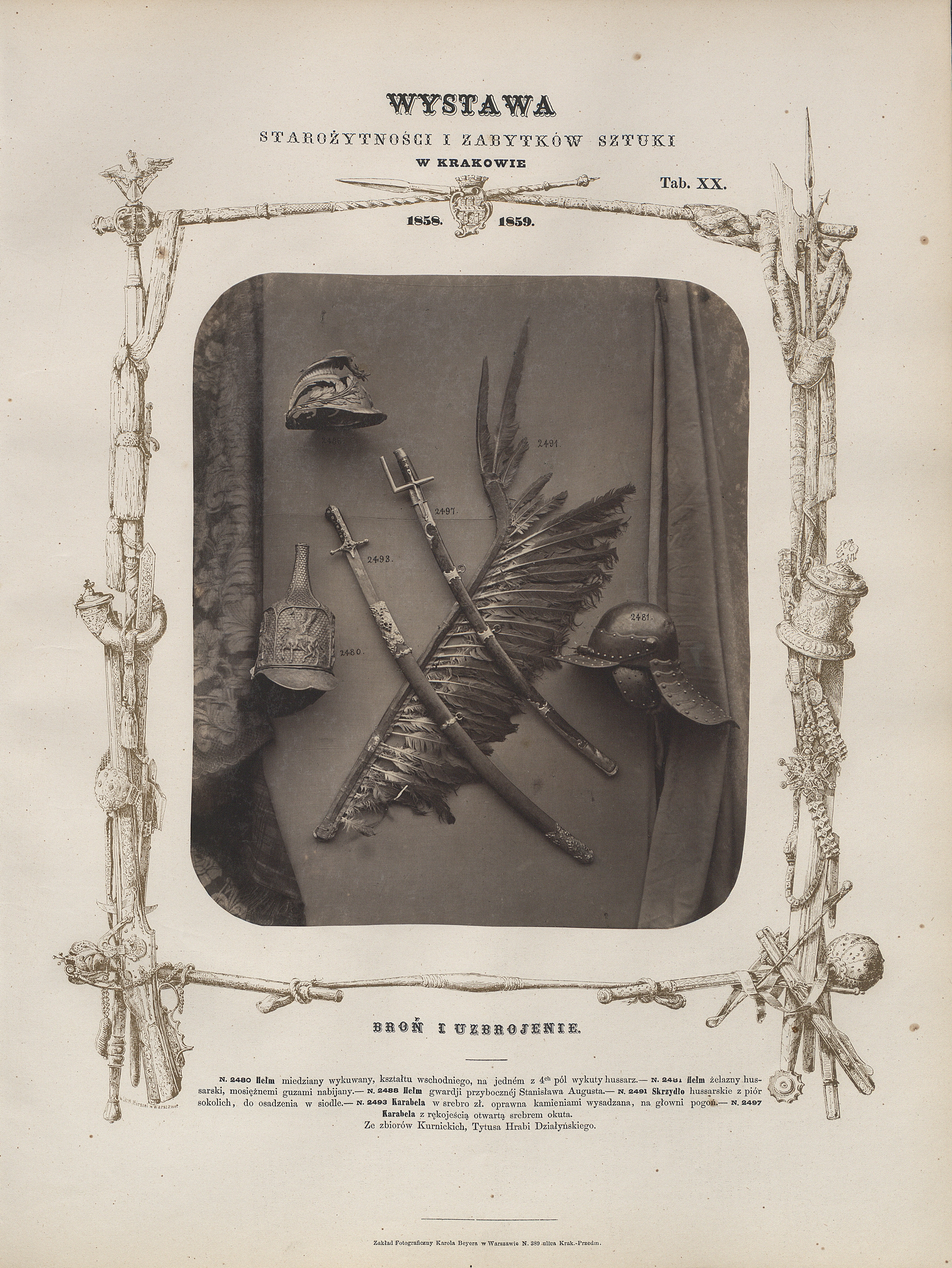 Karol Beyer (autor fotografii), Wojciech Gerson (autor rysunku), H. Hirszel (autor litografii wg rysunku Gersona)